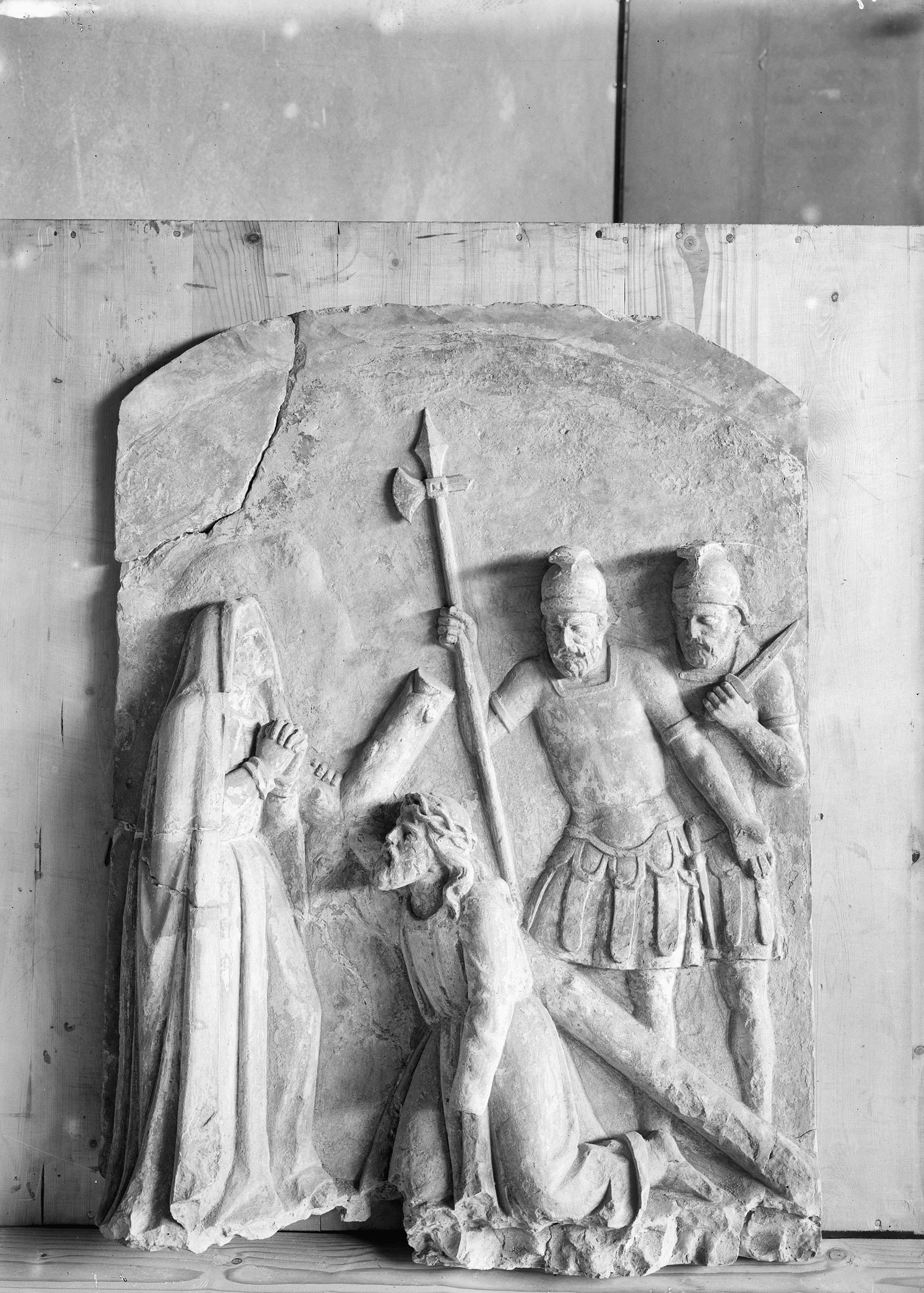 Klooster En Kerk Van De Franciscanen: klooster, de zeven smarten, reli‰fs